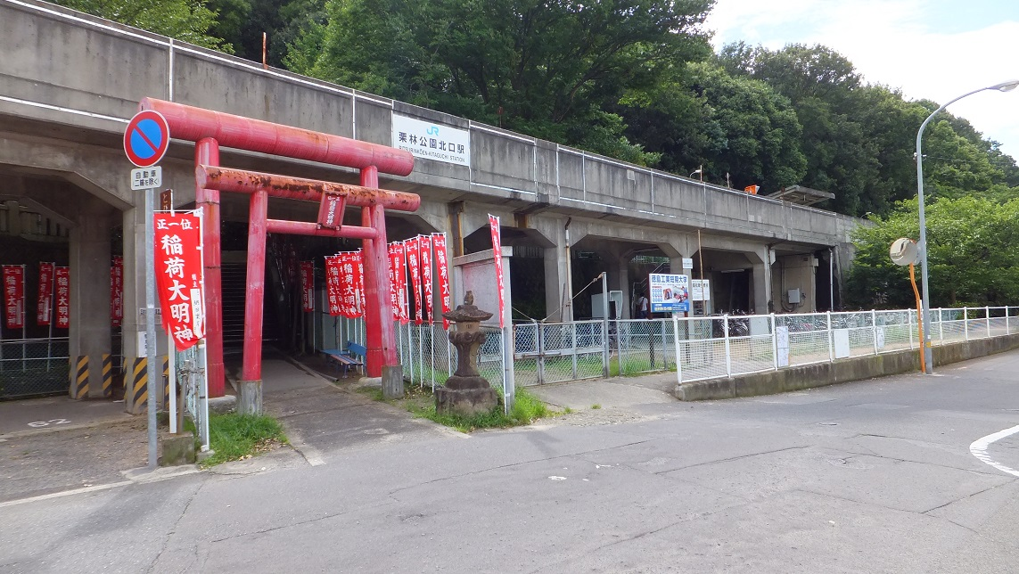 香川県高松市中野町 JR四国高徳線 栗林公園北口駅の入り口（画面右）